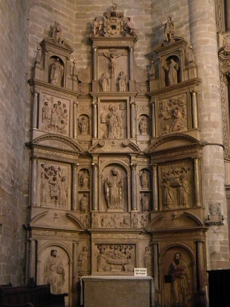 "Retablo de San Ramón Obispo" -- Catedral de Santa María de la Asunción, Barbastro, Huesca, Spain